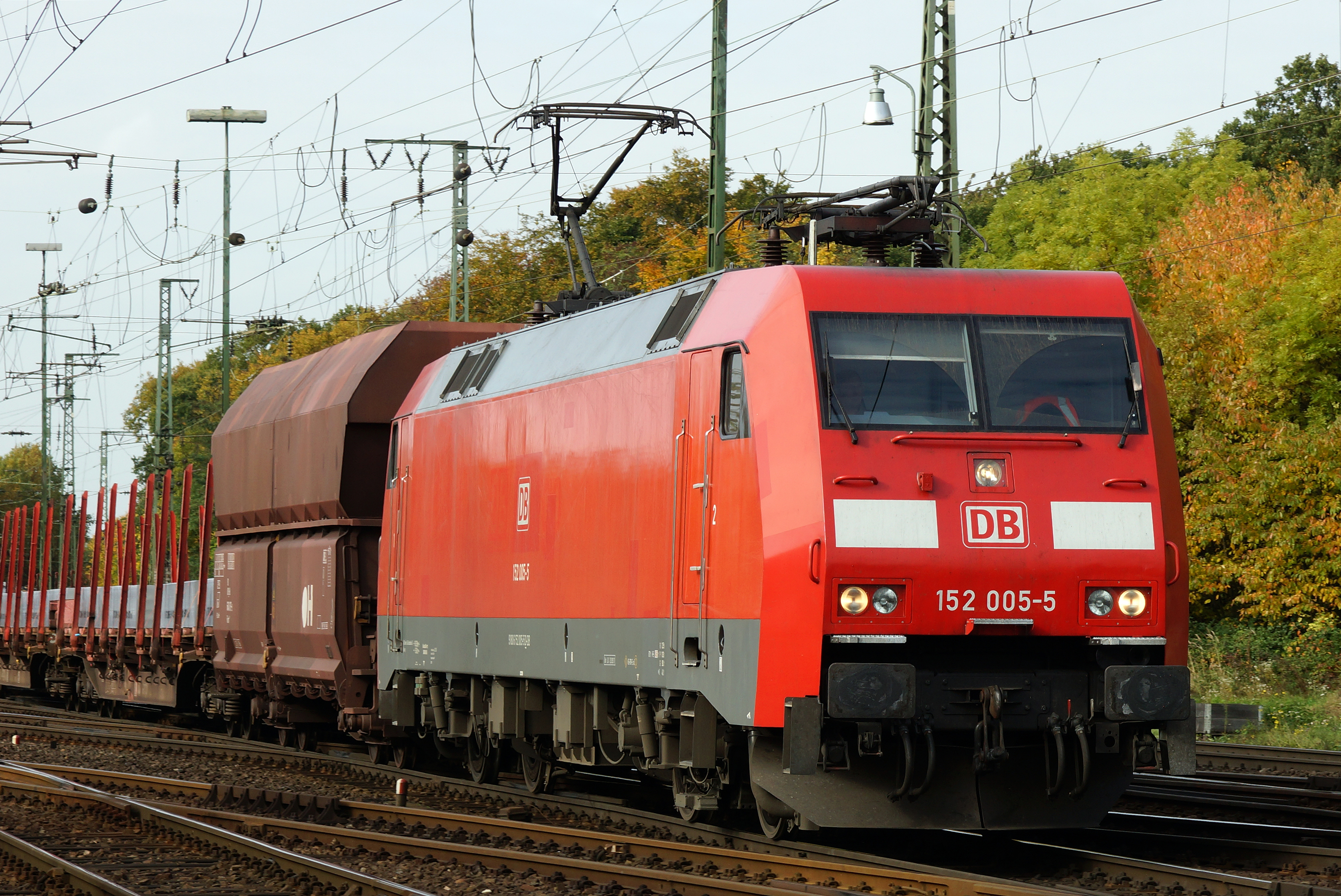 DBAG 152 005-5 in der Nähe des Rangierbahnhof Gremberg.